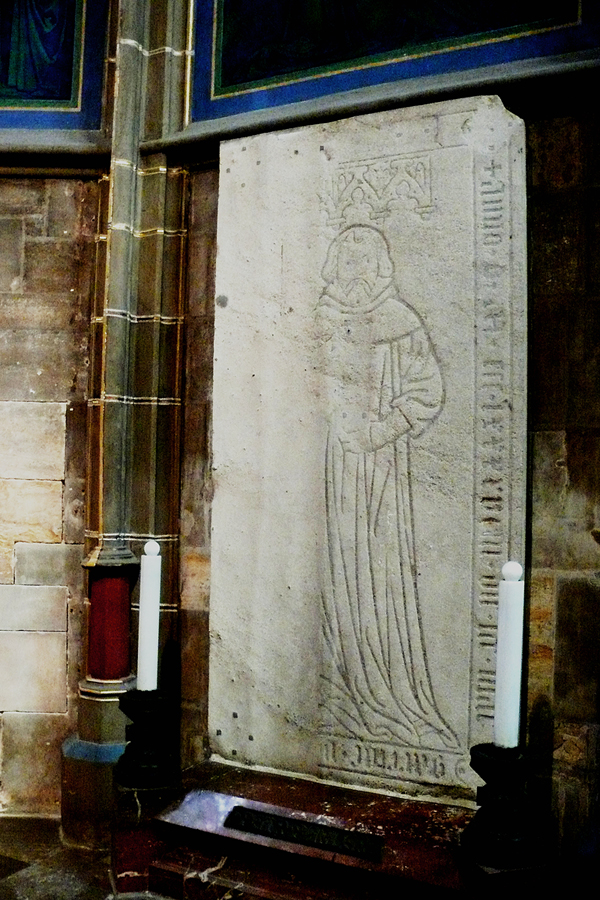 Česky: Náhrobní deska Petra Parléře